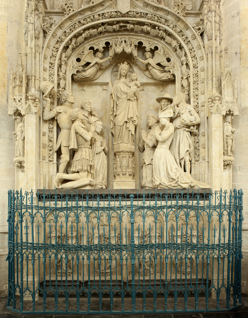 Grafmonument Engelbert I van Nassau, rond 1475 gebouwd